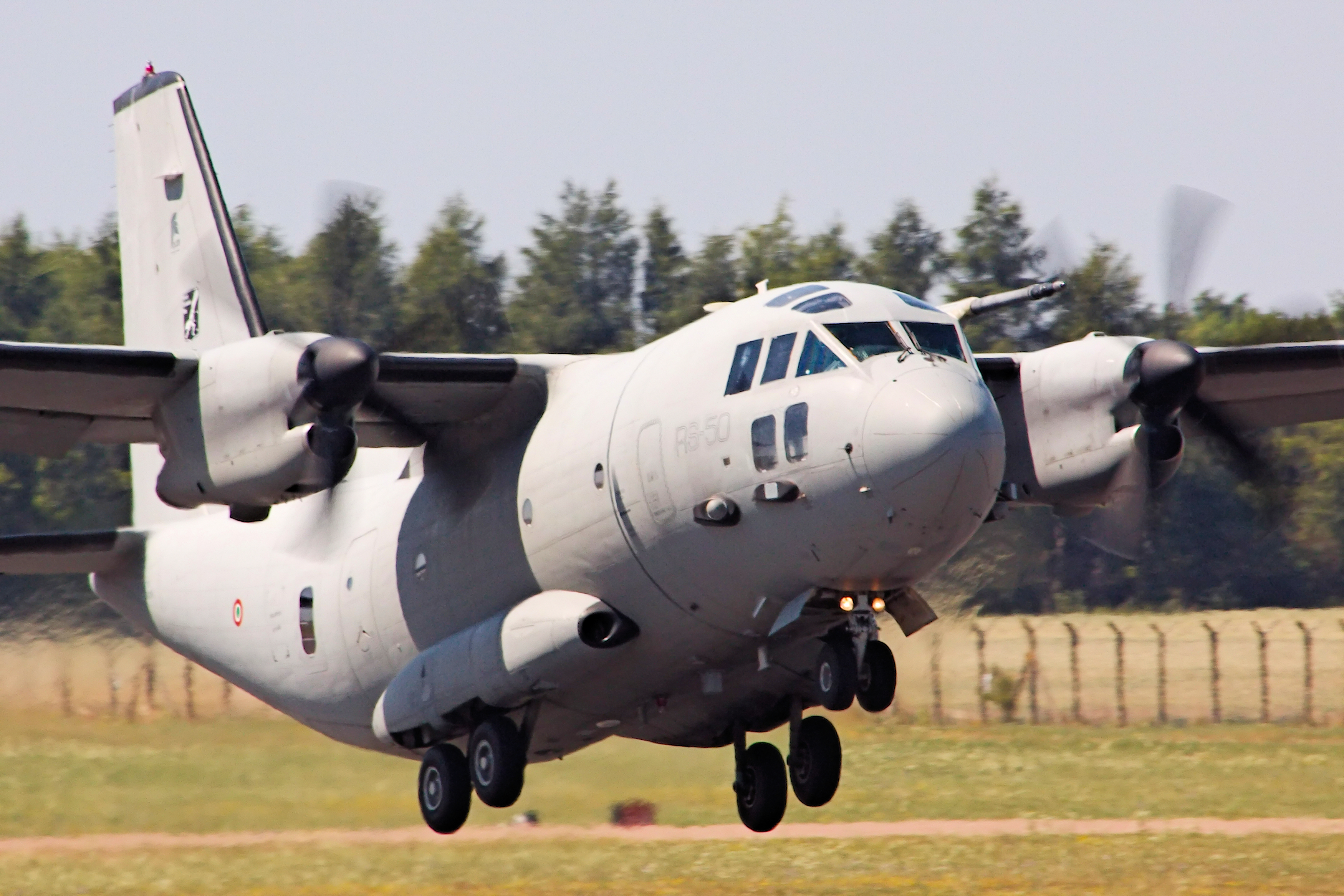 C27J Spartan - RIAT 2013